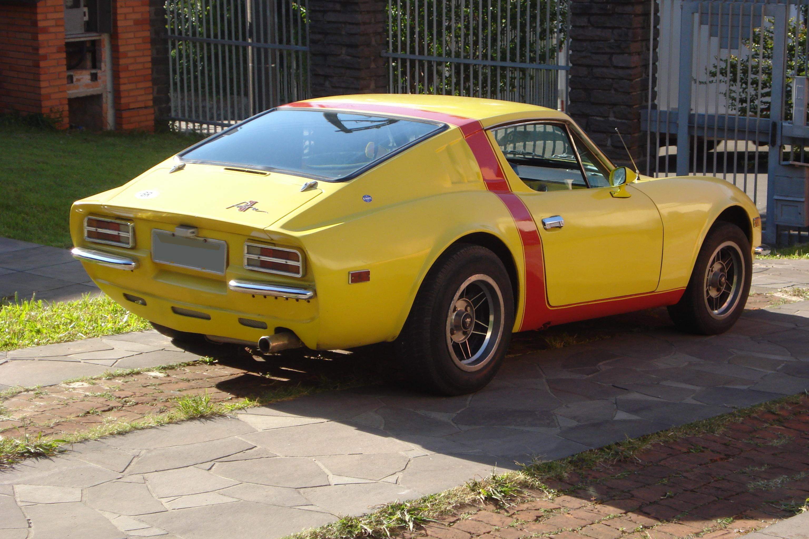 Imagem de minha autoria